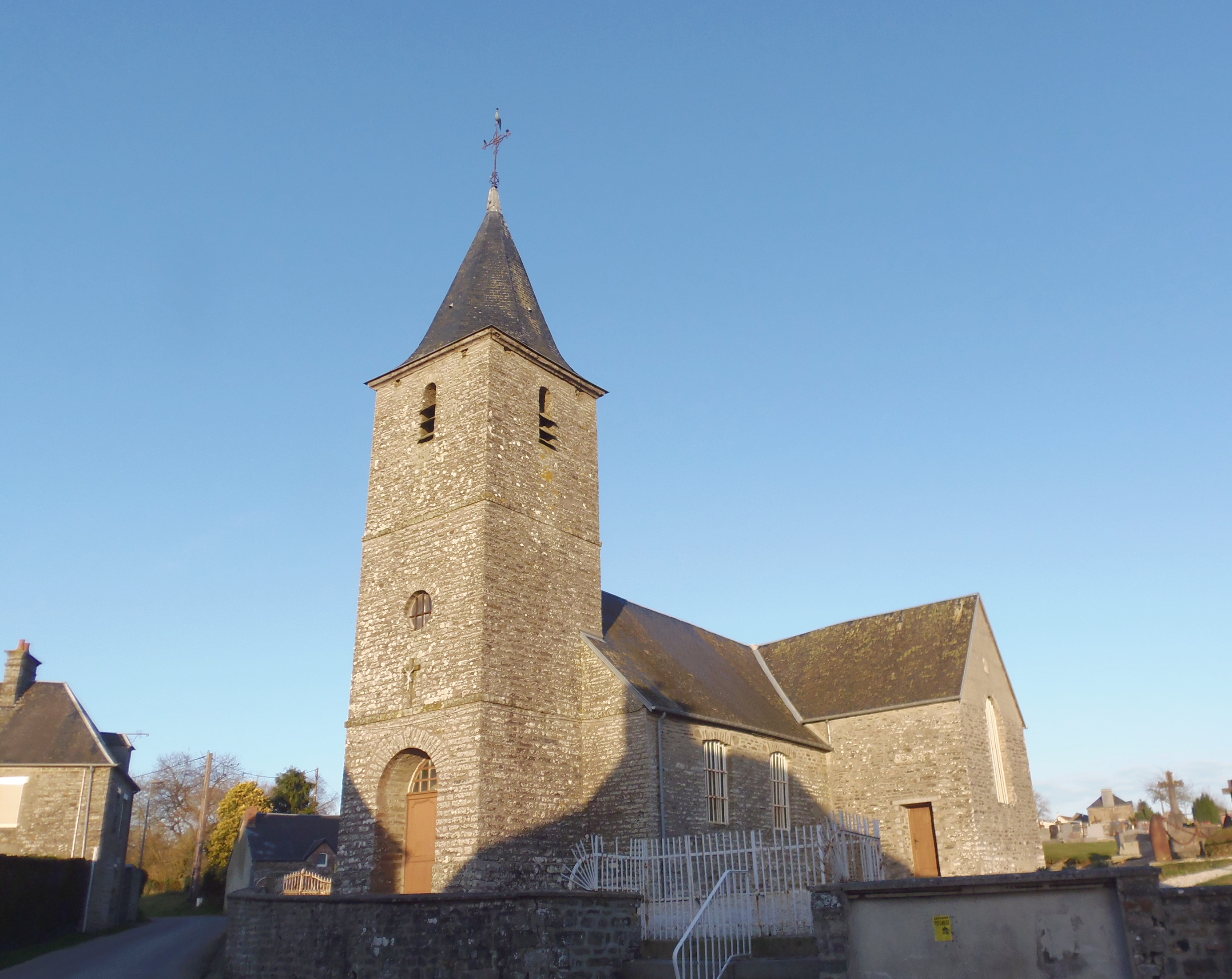 Saint-Pierre-Tarentaine (Normandie, France). L'église Saint-Pierre.